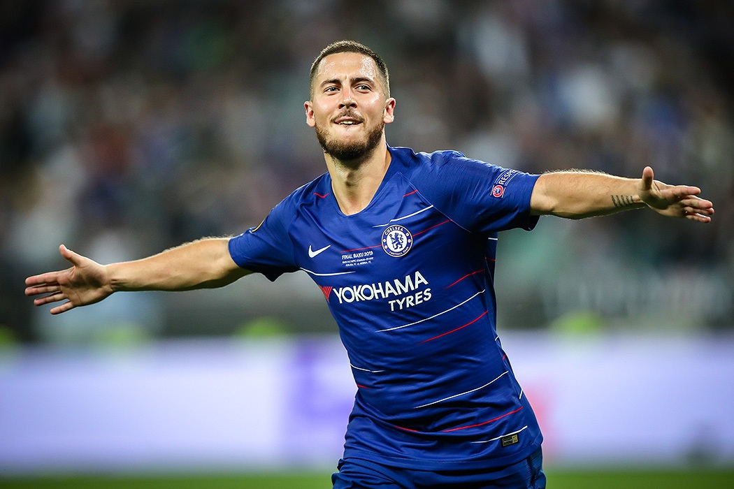 مسابقه چلسی و آرسنال، فینال لیگ اروپا ۲۰۱۹